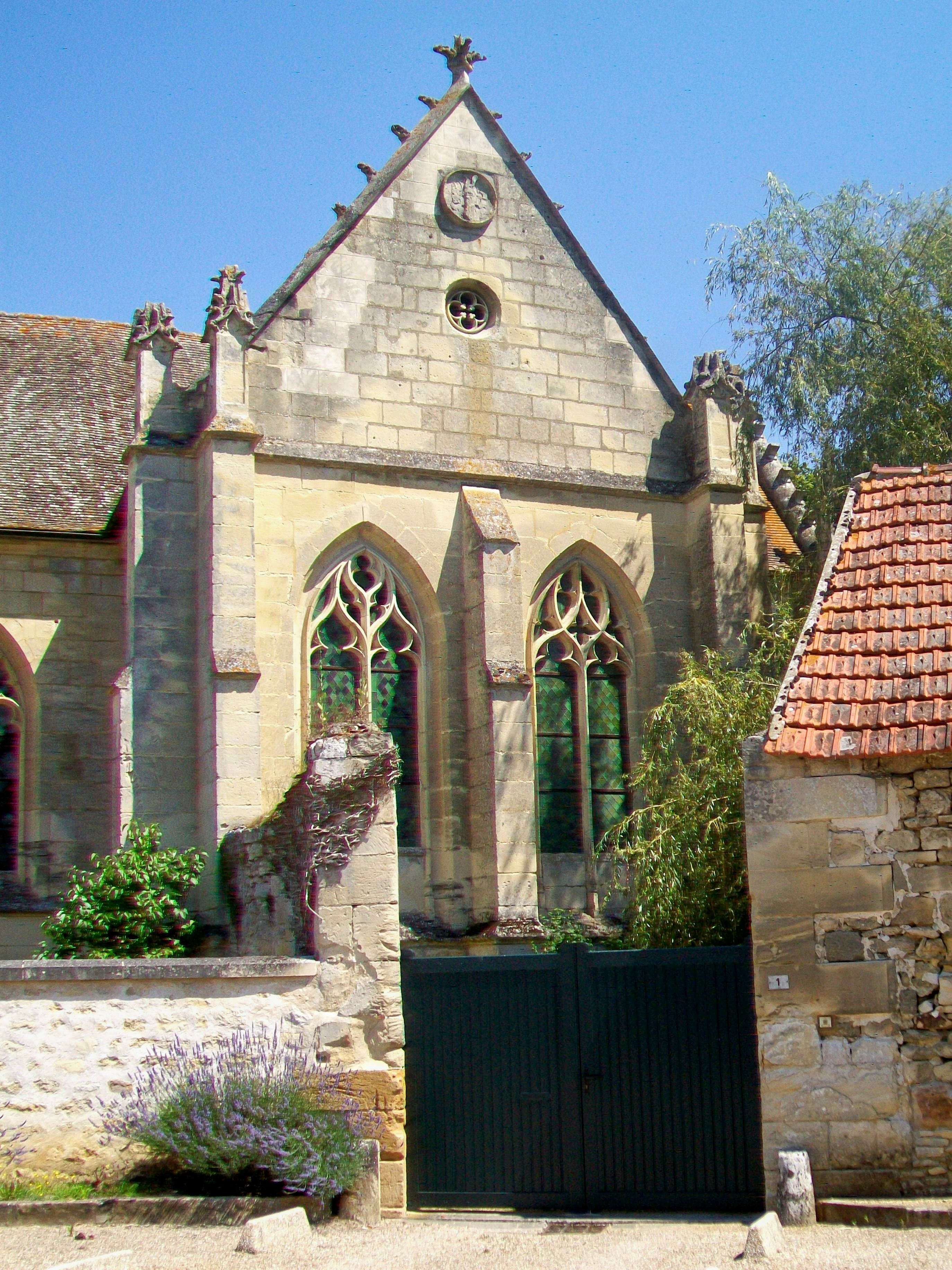 Façade du transept sud.